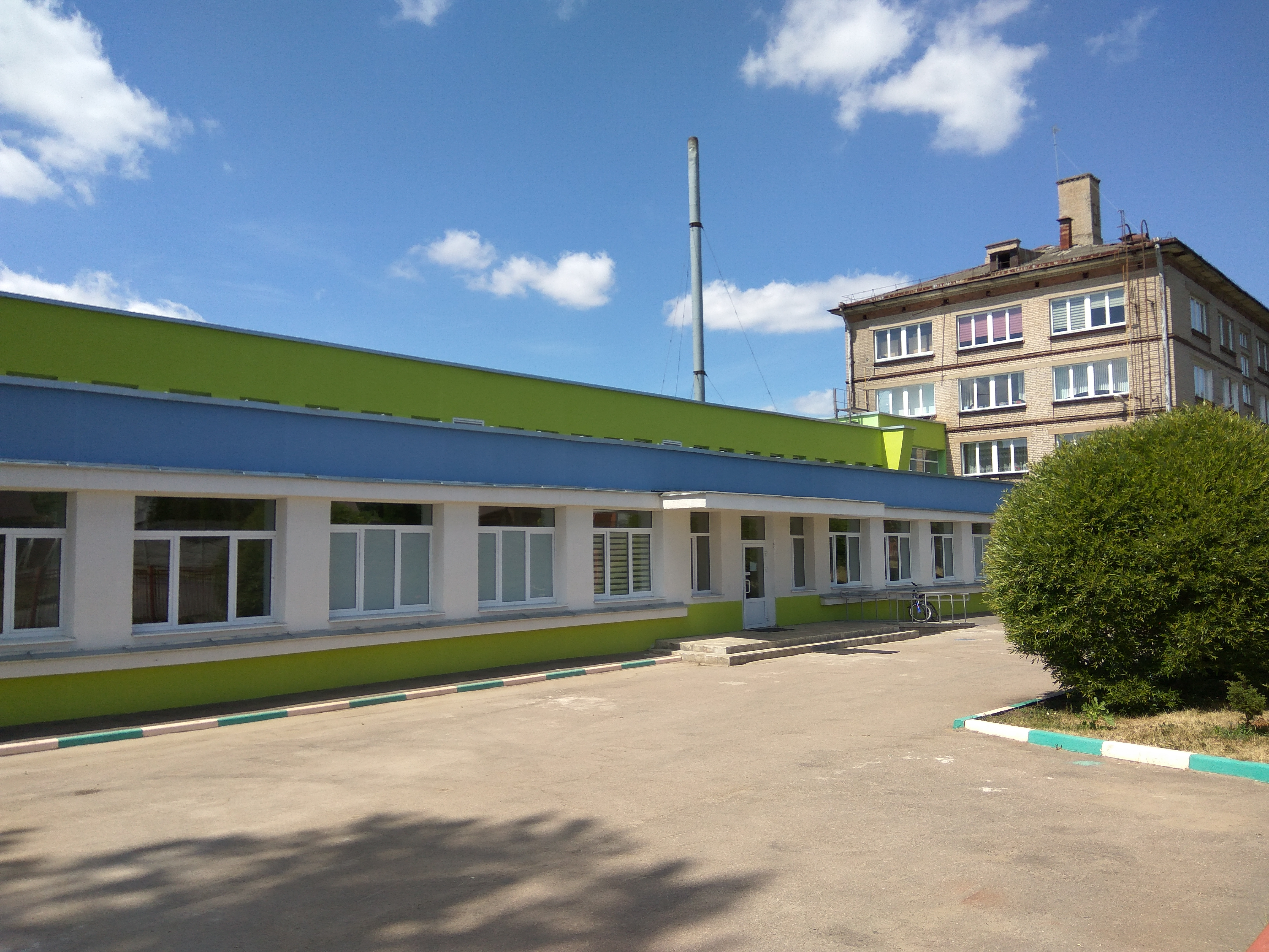 Мінск. Чарнігаўская вуліца